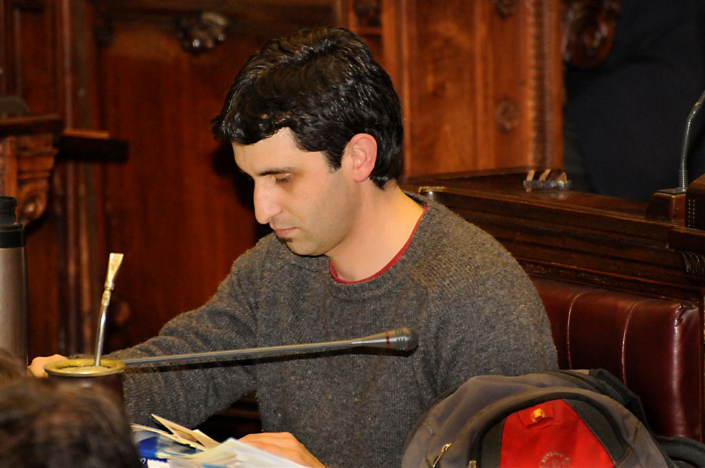 Representante Nacional